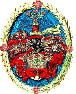 Wappen Stammbuchhalters Wolfgang Marcus Gualtherus aus dem Stammbuch des Wolfgang Marcus Gualtherus entstanden in Weinheim 1600.